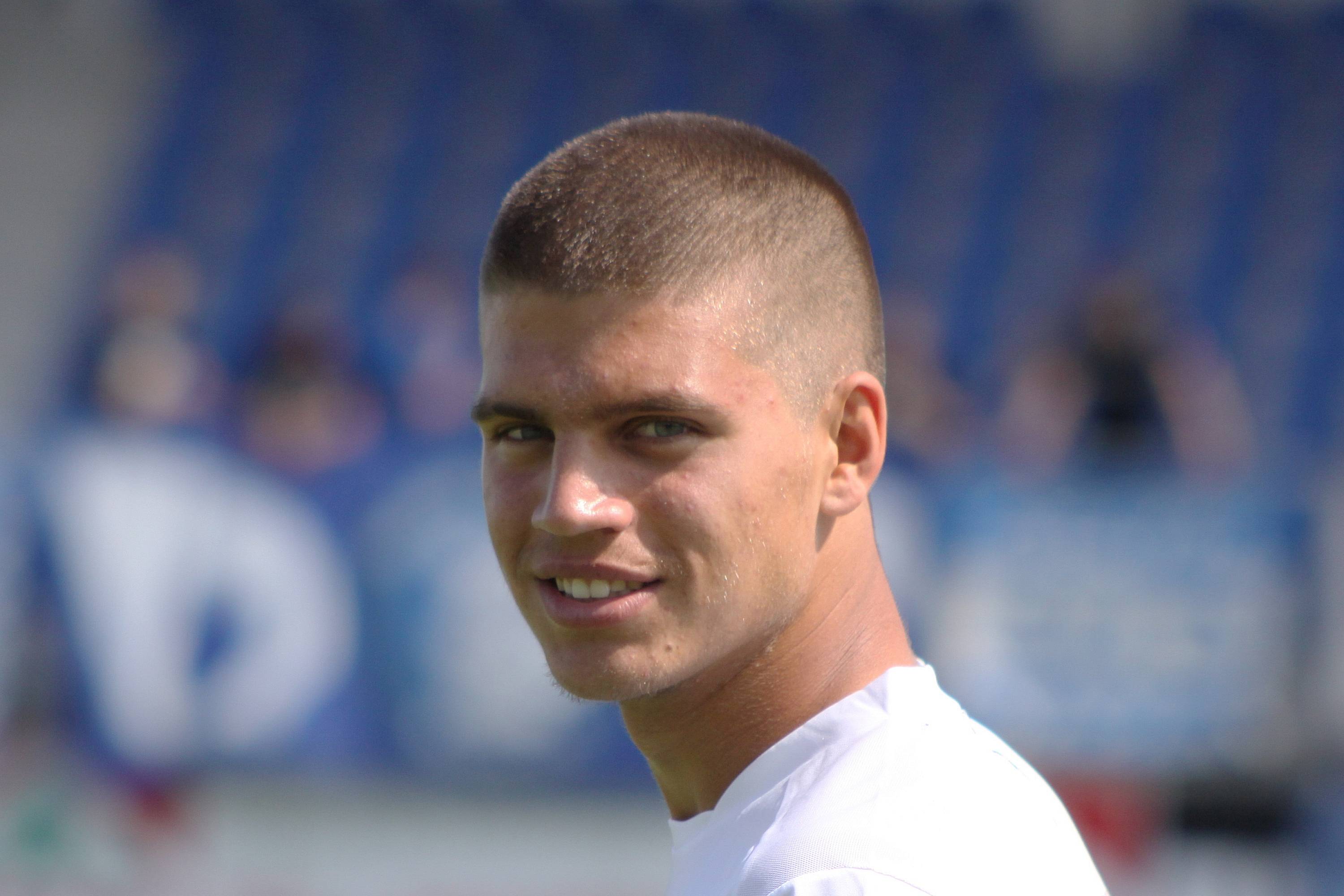 Lennart Hartmann – Hertha BSC Berlin (2)